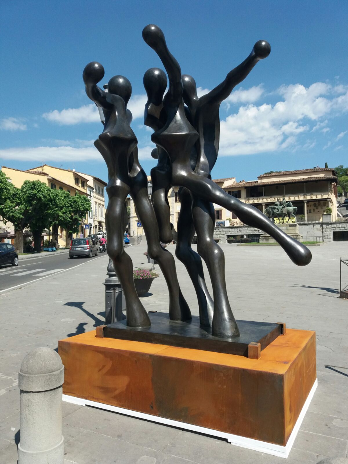 Monument of Sauro Cavallini - location Fiesole (Florence)